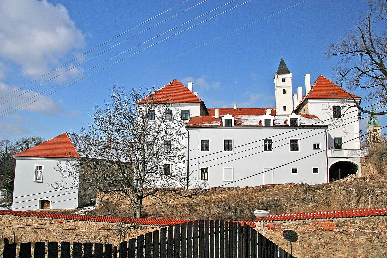 Zámek v Zásmukách autor: Prazak Date: 27. 2. 2006